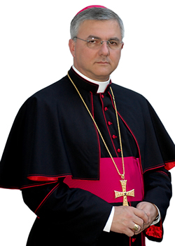 Foto Oficial de D Edney Gouvêa Mattoso